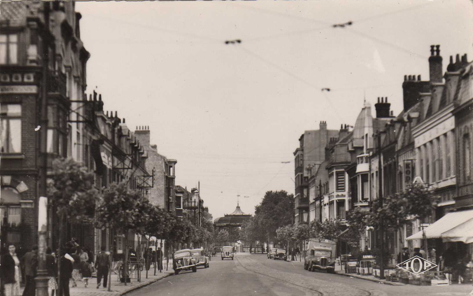 Carte postale des années 1940 de l'avenue Faidherbe